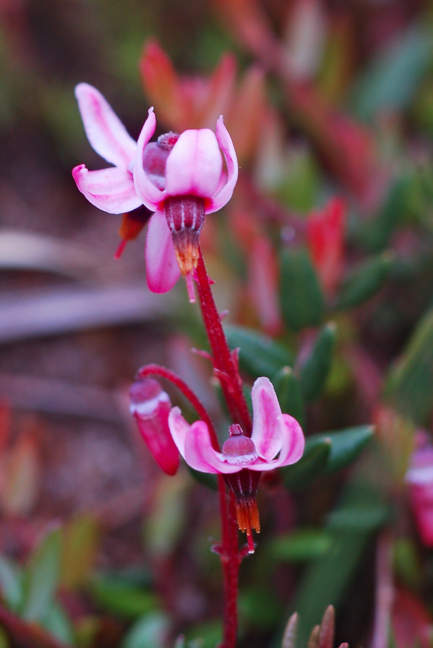 Gewöhnliche Moosbeere (Vaccinium oxycoccos) in den Hangmooren des Ebbegebirges (NSG „Auf’m Ebbe/Ebbemoore“, Märkischer Kreis, NRW)